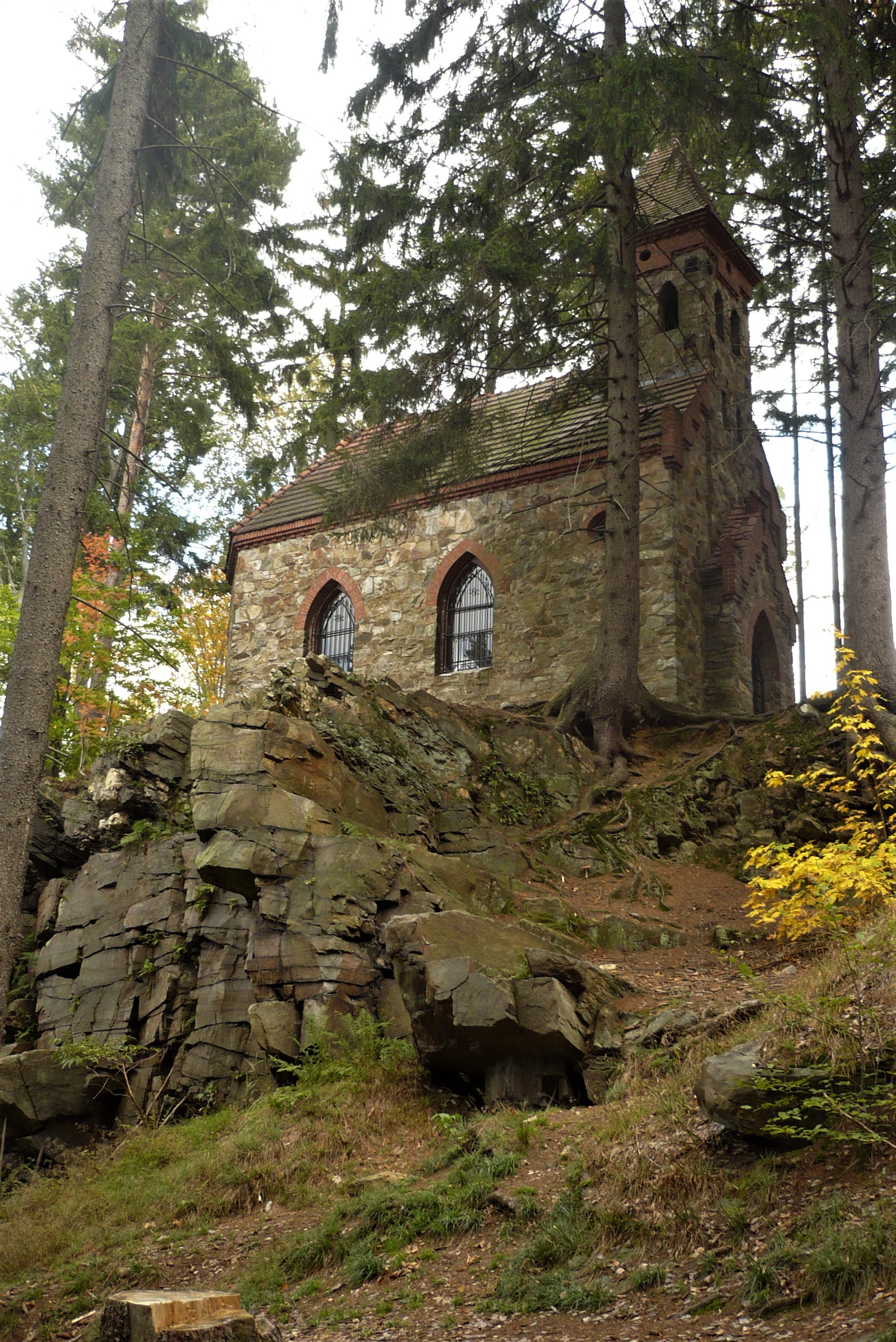 Kościół pw. św. Anny na Parkowej Gorze